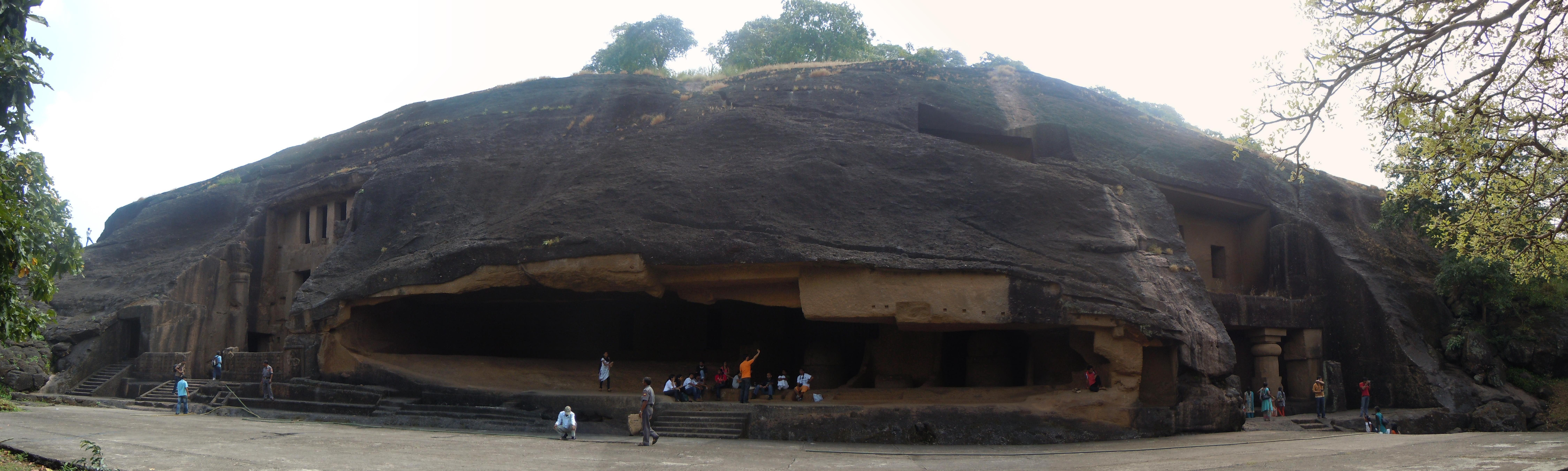 Kanheri - vue d'ensemble des grottes - Maharashtra - Mumbai - Inde